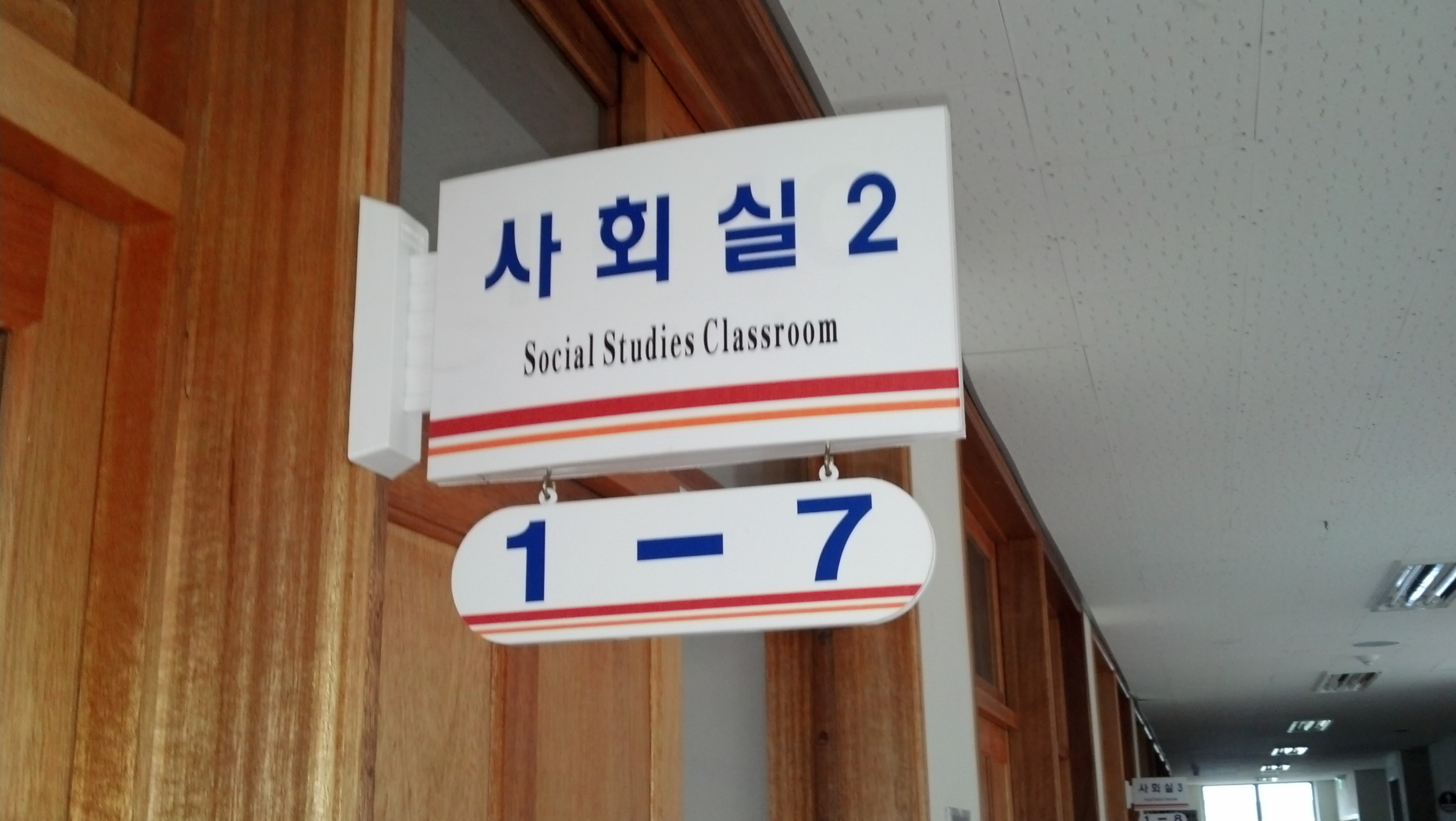 교과교실제